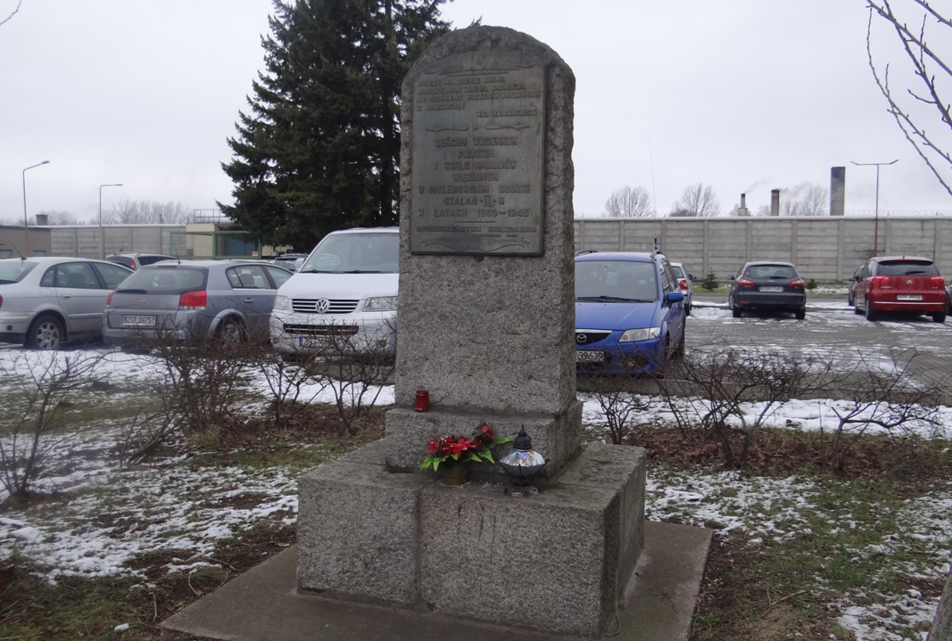 Pomnik ofiar obozu Stalag-II-D